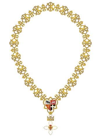 Ordenskjedet for Vytautas den stores orden, Litauen.